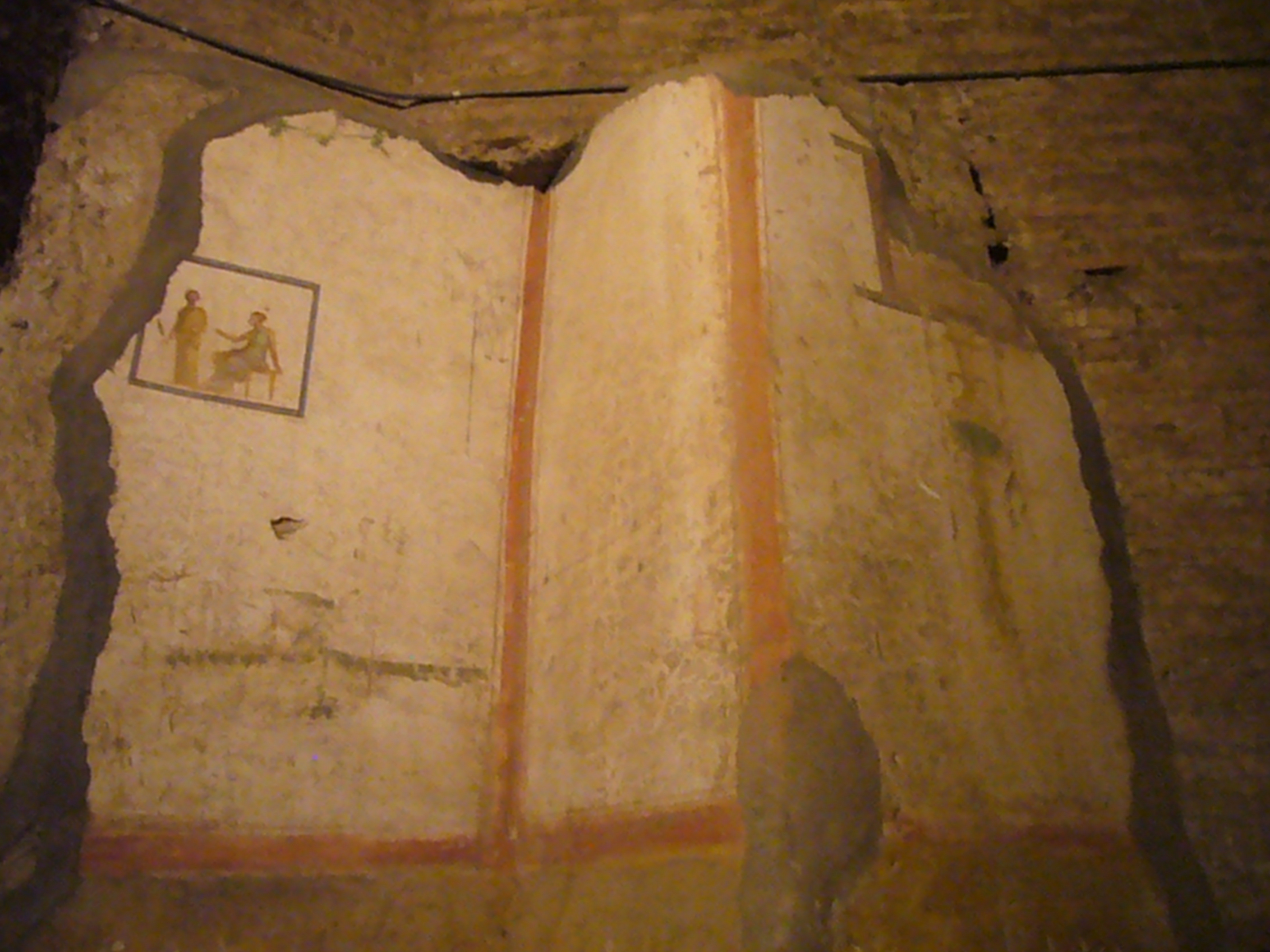 Roma, Laterano, scavi della Caserma degli Equites singulares sotto la basilica di San Giovanni - affreschi residui della domus di III sec.